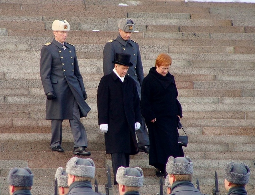 Suomen tasavallan presidentinvaihdos vuonna 2012